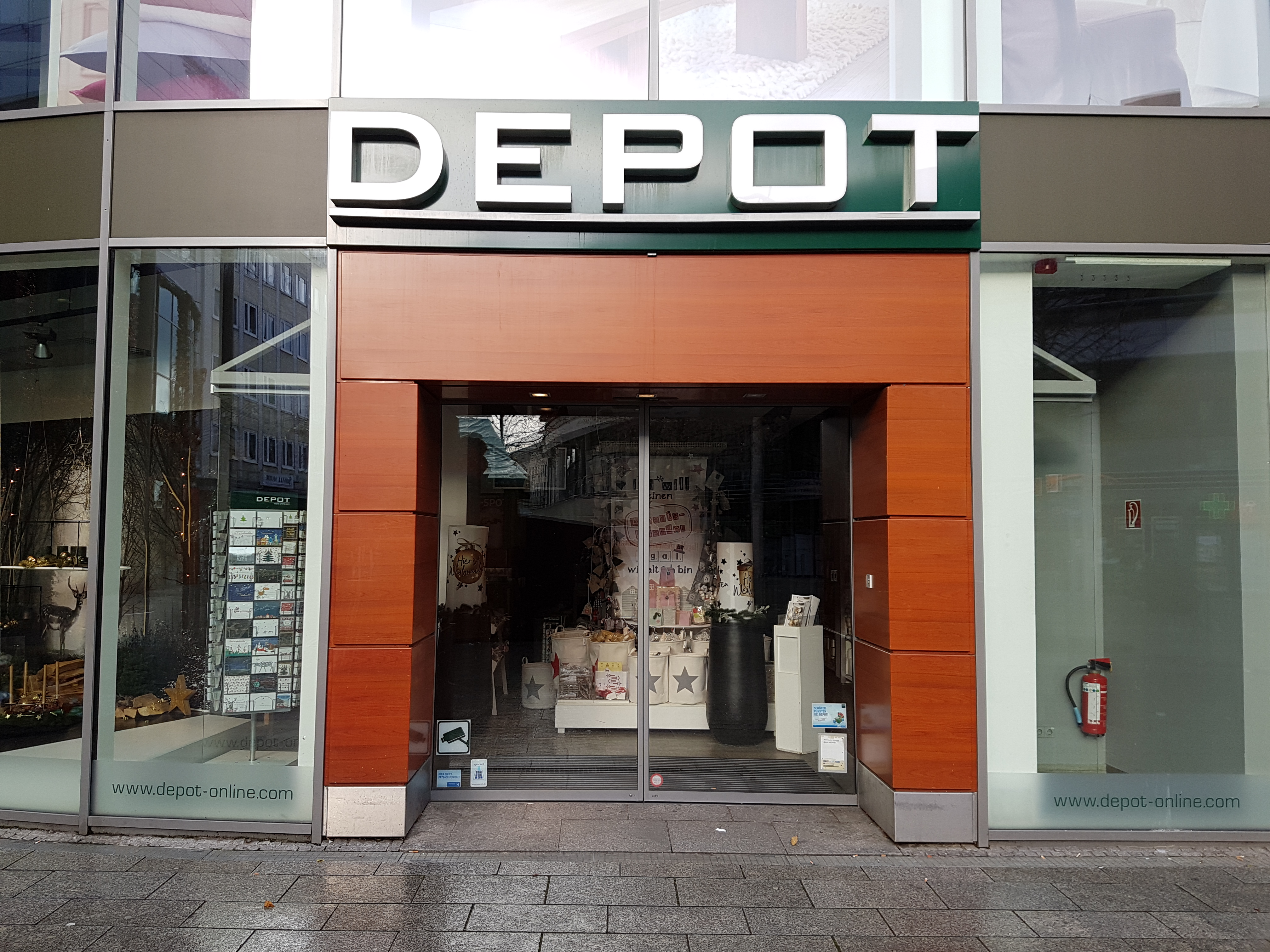 Depot Laden in Hagen (NRW)